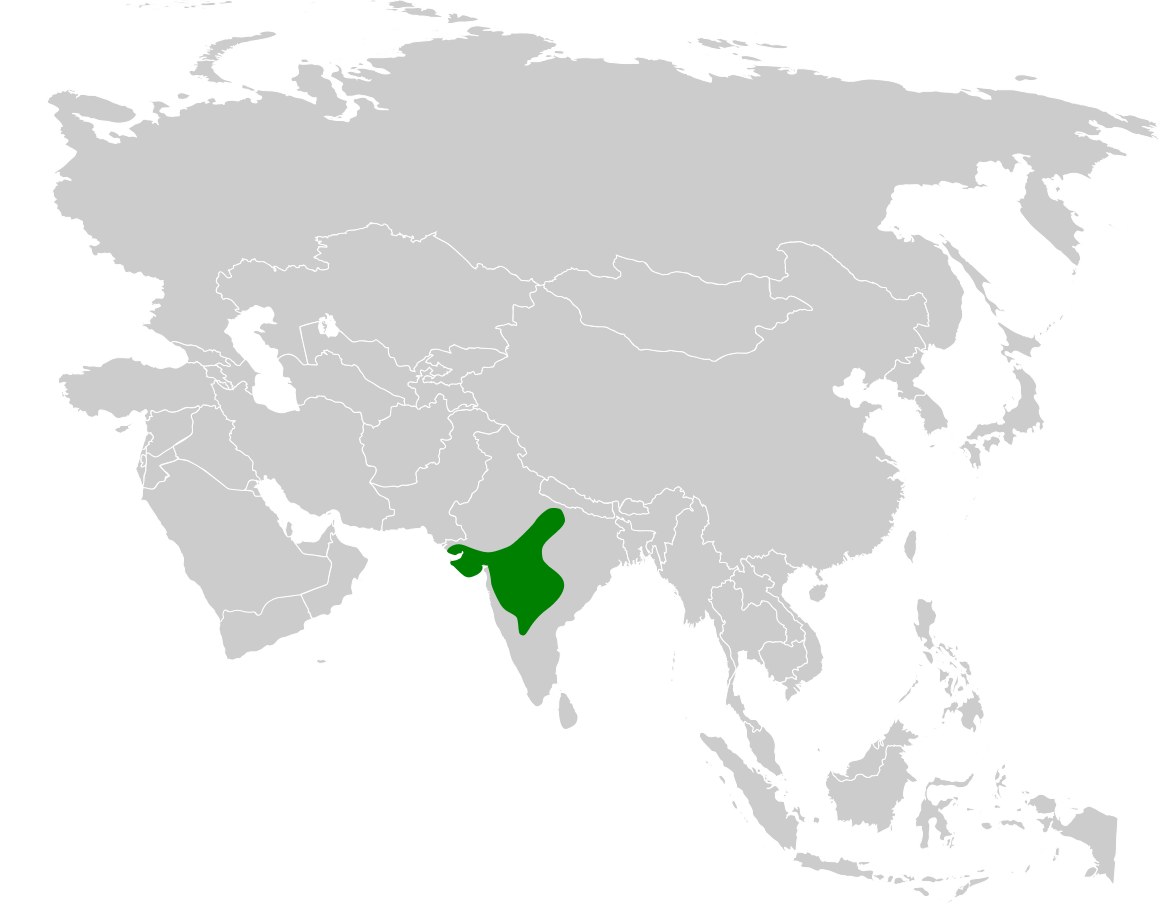 Galerida deva distribution map based on